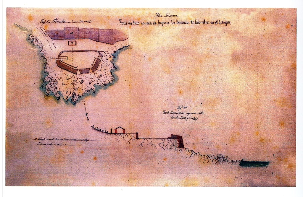 Forte do Porto na costa da freguezia dos Biscoutos...", Ilha Terceira (Açores), Portugal.